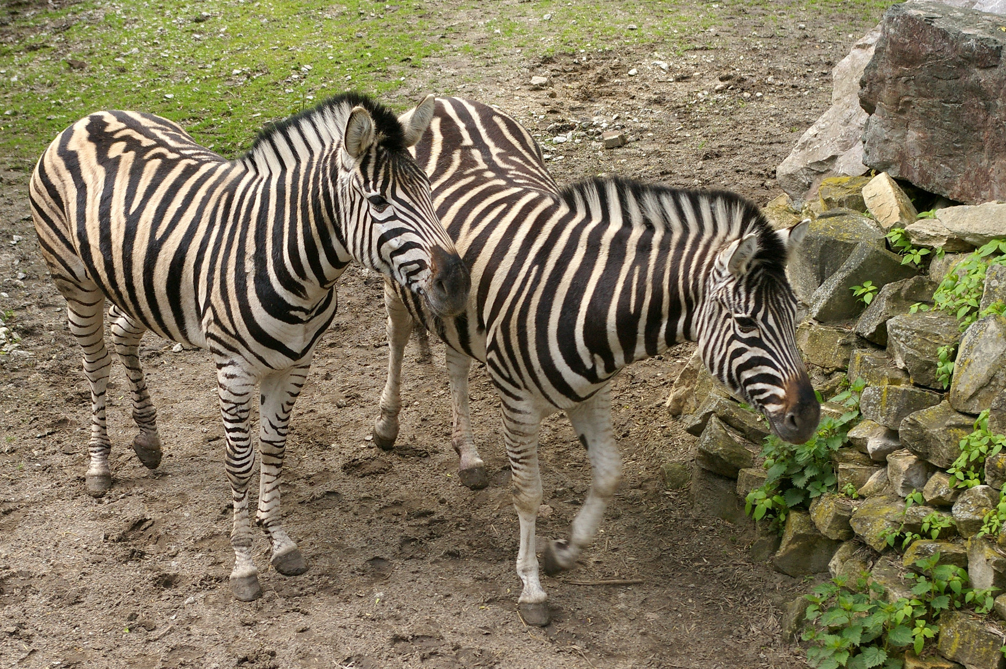 Zebra Chapmana w łódzkim zoo.